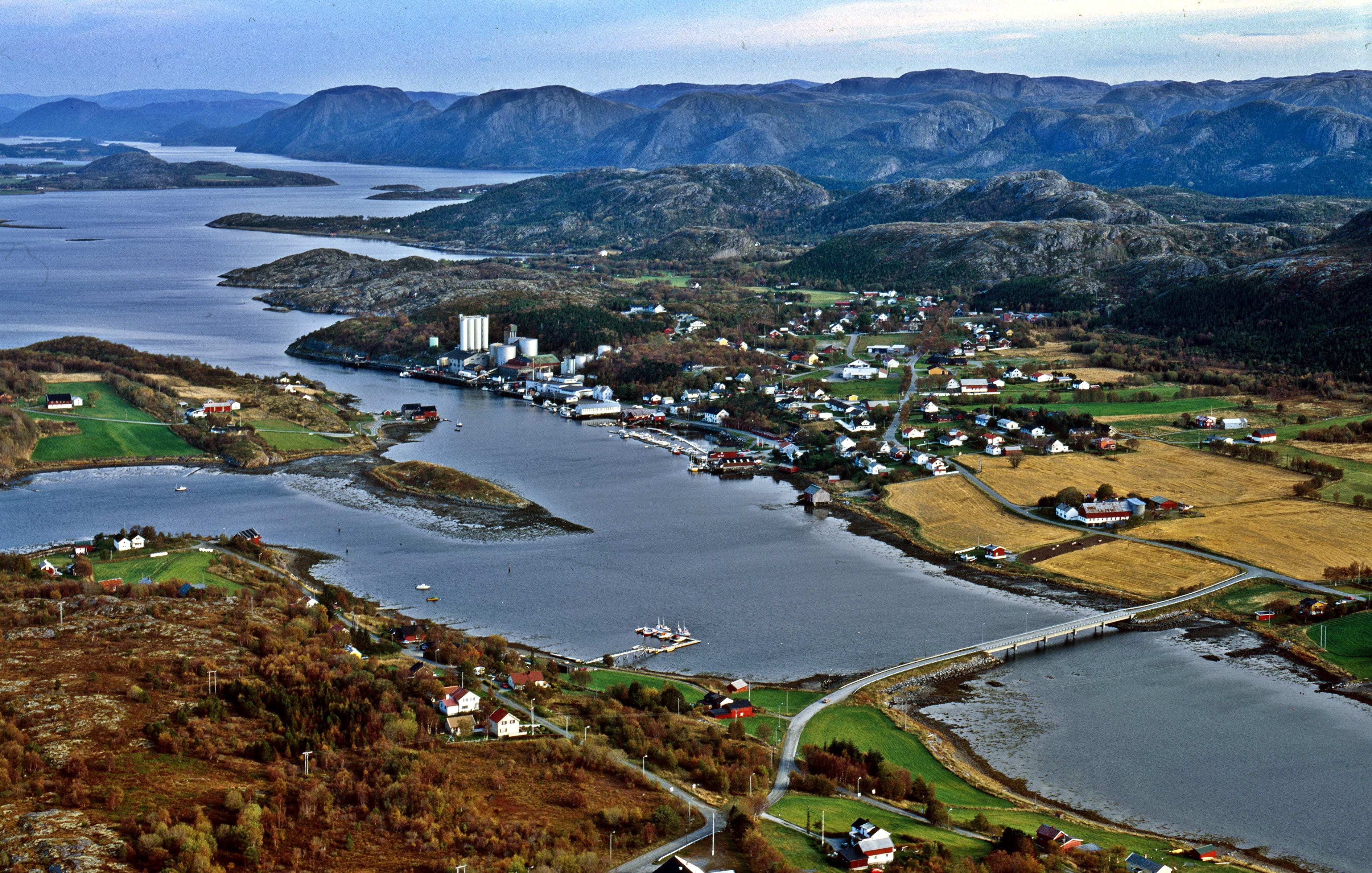 Lysøysund i Bjugn kommune i år 2000